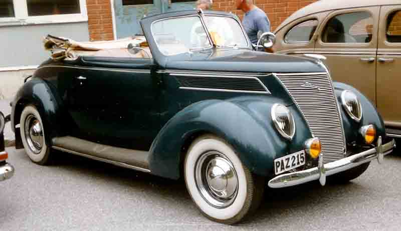 Ford Model 78 760B Club Convertible 1937